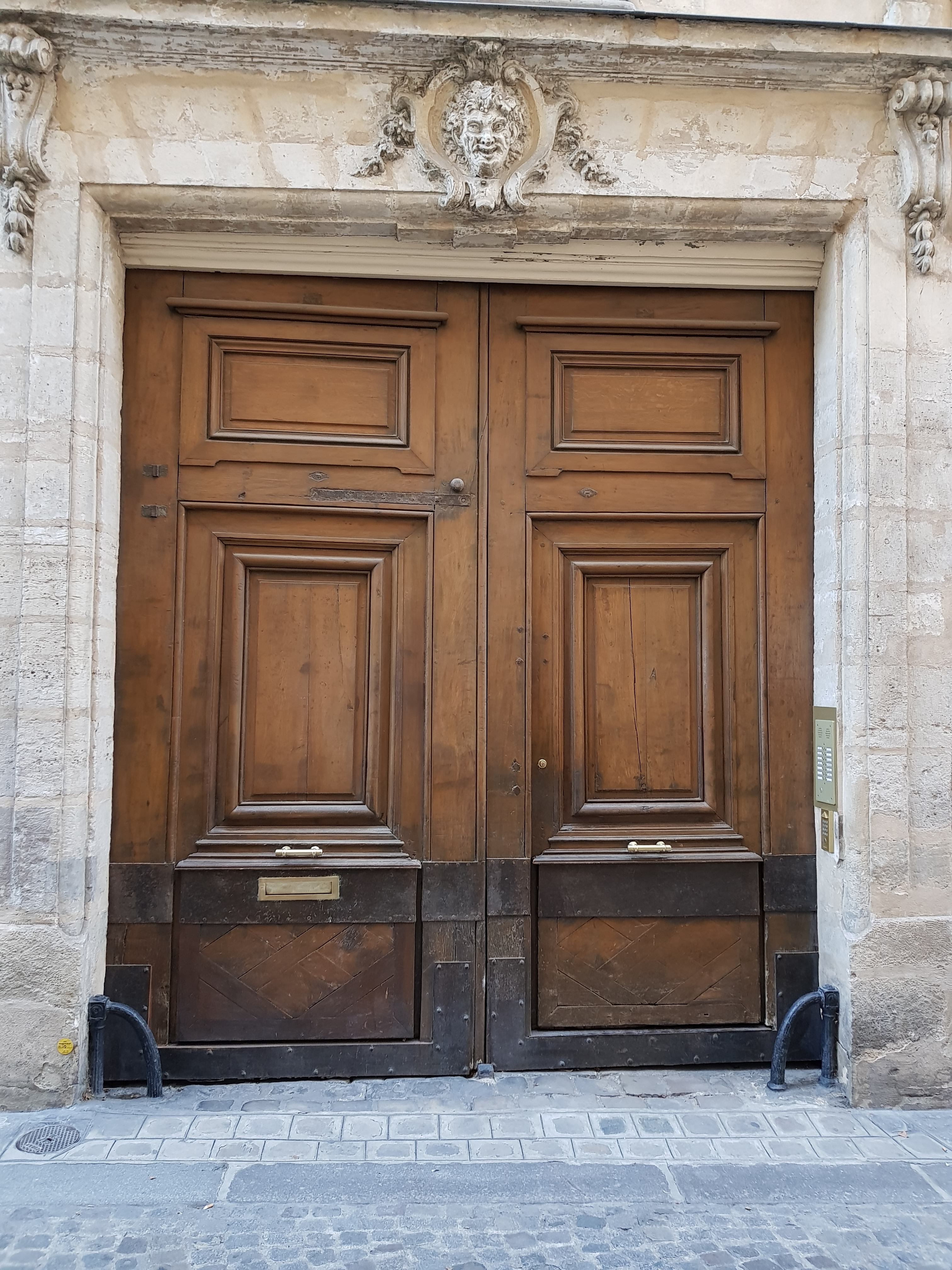 Porte du 4, rue Férou, Paris 6e.